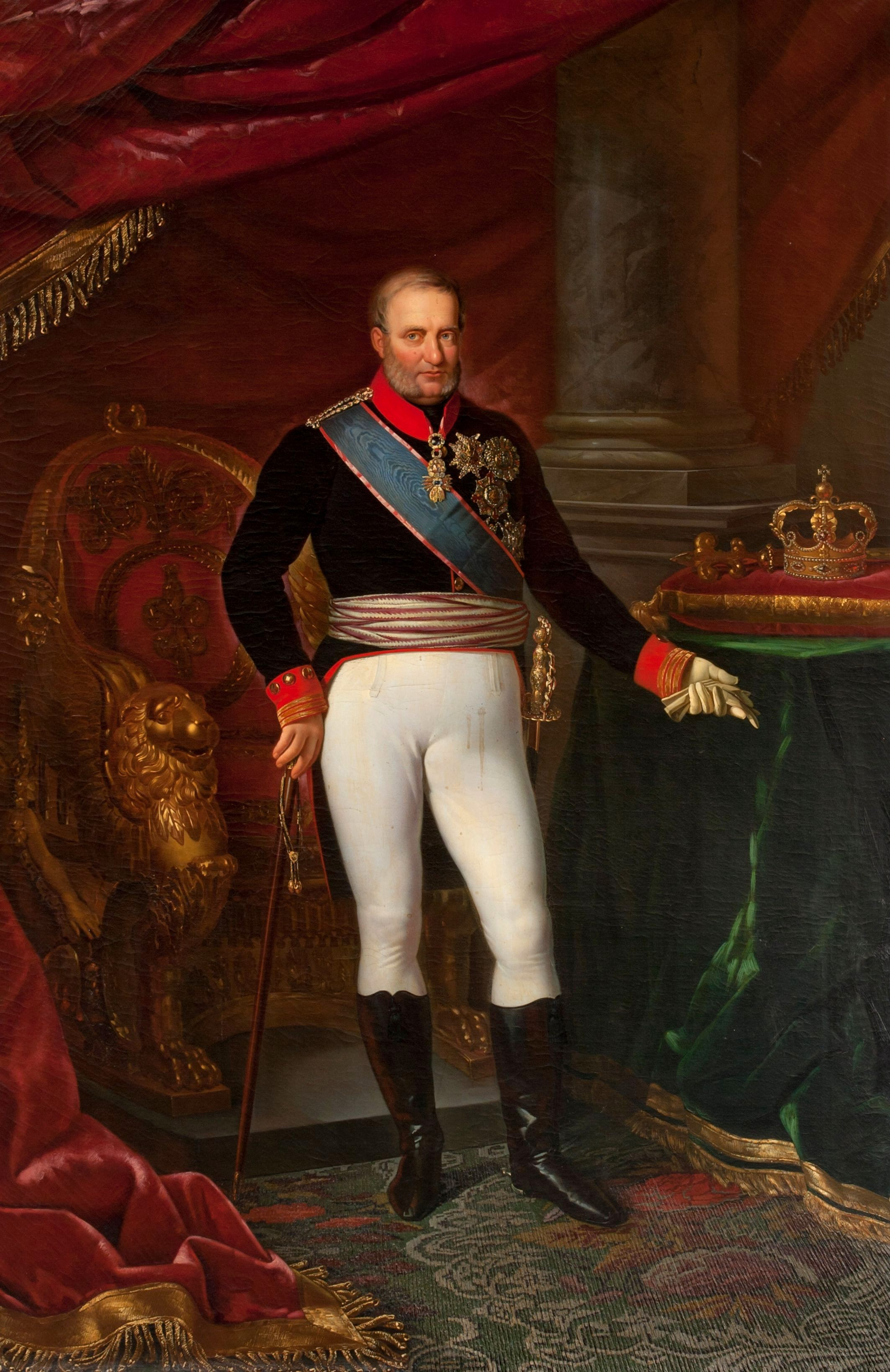 Ritratto di Francesco I delle Due Sicilie (1777-1830)